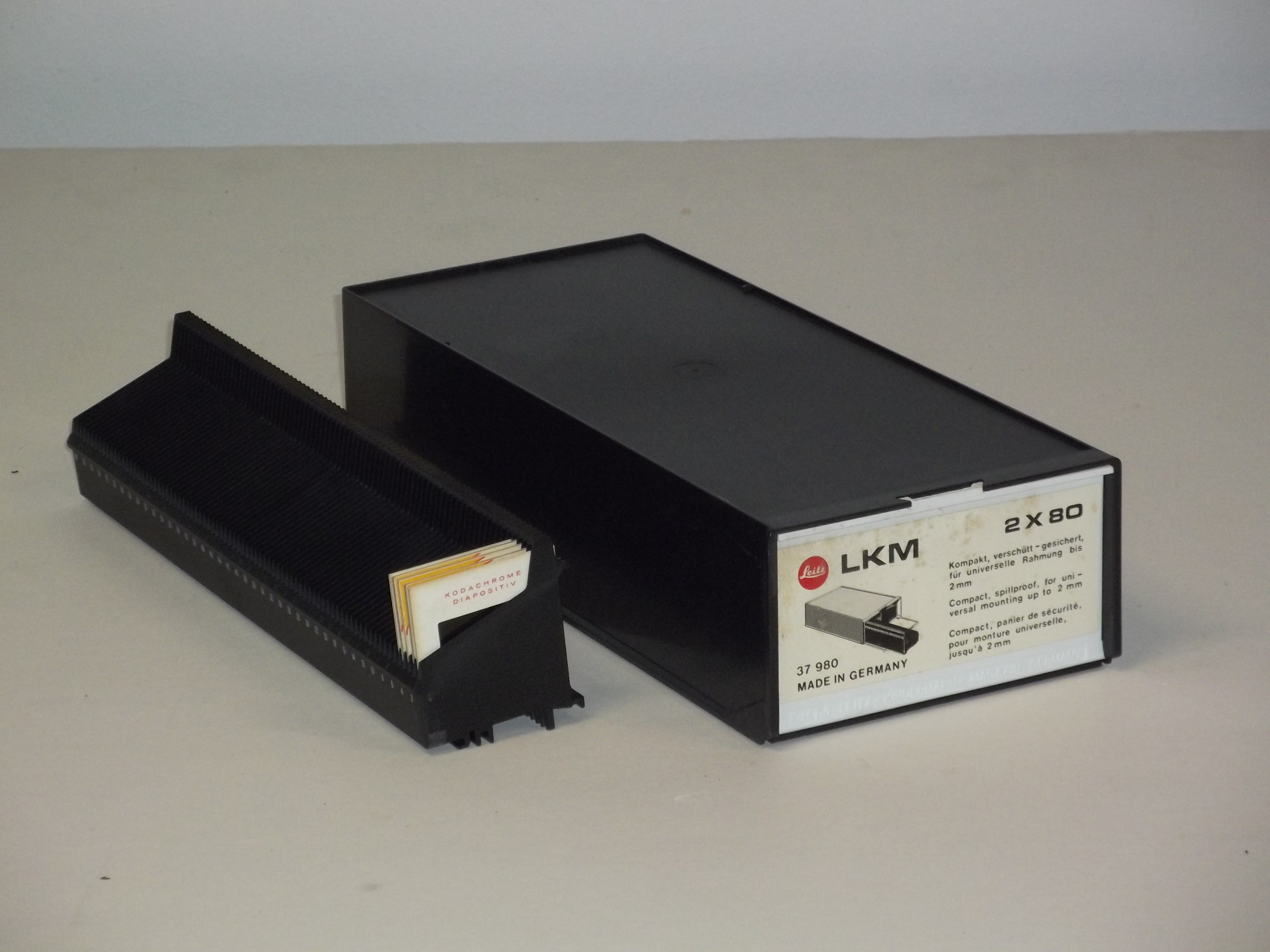 LKM (Leitz- Kinderman- Magazin) für Diapositive 5 x 5 cm, max. 2 mm dick, 80 Dias pro Magazin, der Projektor muss für diese Magazine eingerichtet sein.